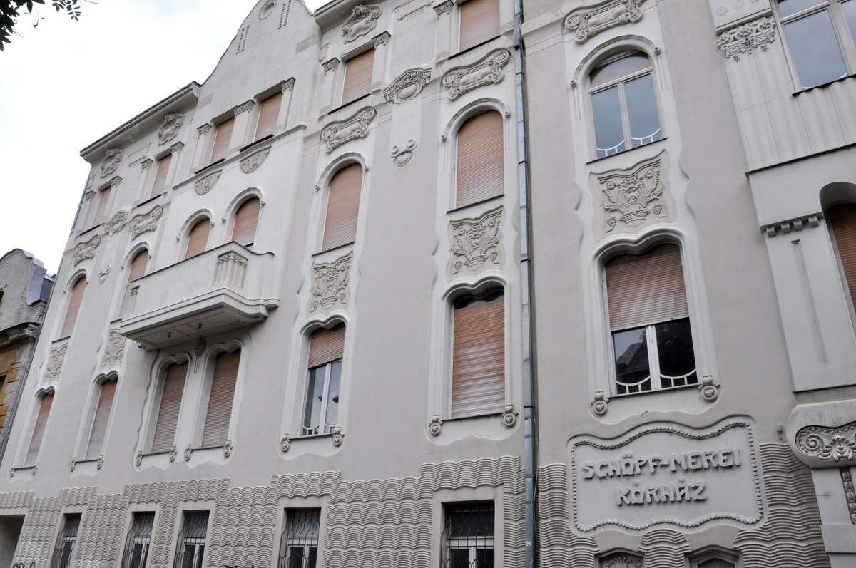 Schöpf-Merei Hospital, Bakáts tér, Budapest, Hungary